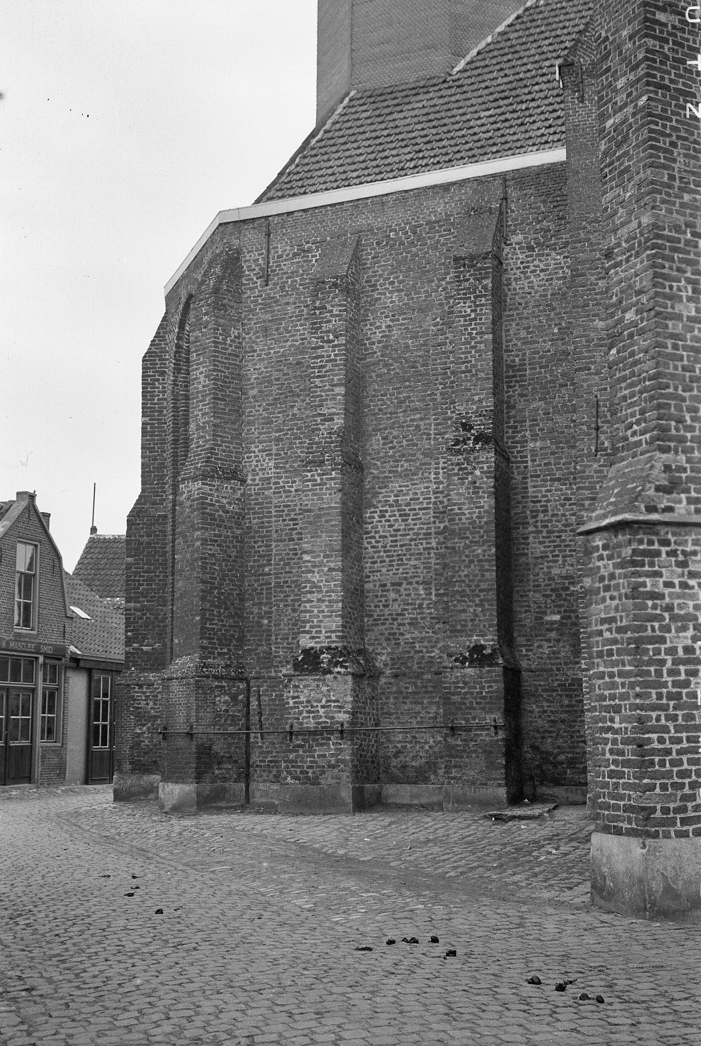 Nederlands Hervormde Kerk: koor